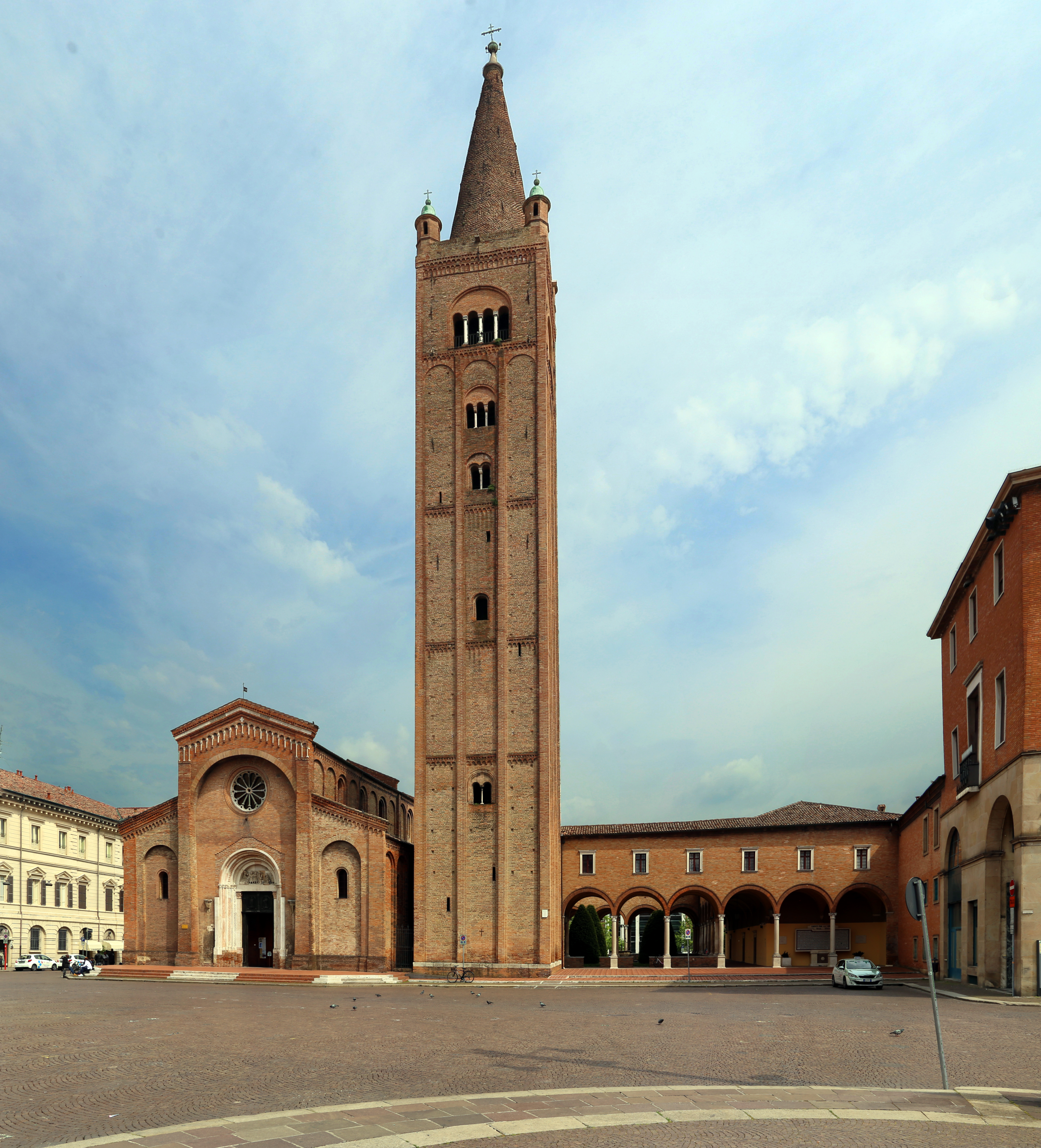 abbazia di San Mercuriale This is a photo of a monument which is part of cultural heritage of Italy.